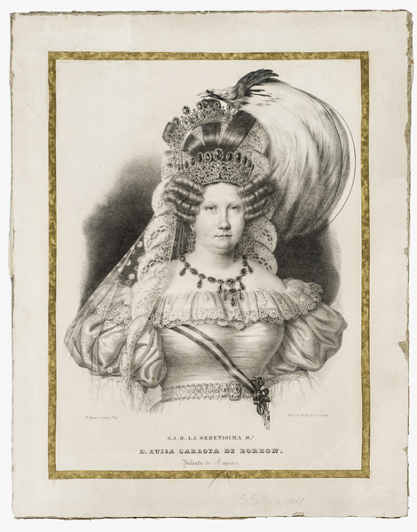 Estampa. Luisa Carlota de Borbón, Infanta de España.